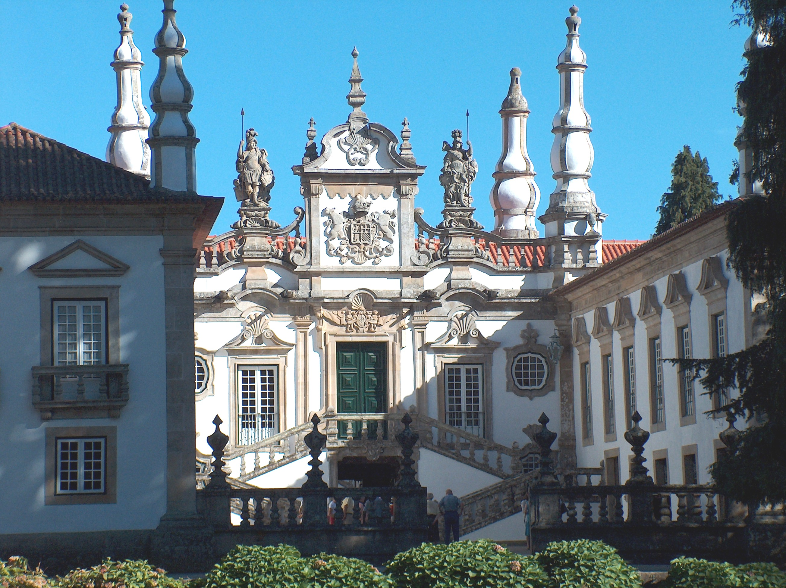 Descrição Palácio de Mateus freguesia de Mateus, concelho de Vila Real, Distrito de Vila Real, Portugal. Fonte Carregada pelo autor Autor João Carvalho